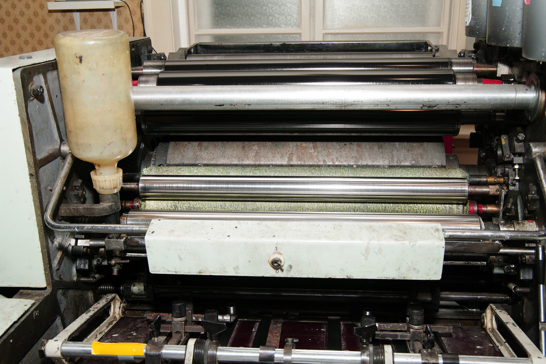 Nyomdagép hengersora